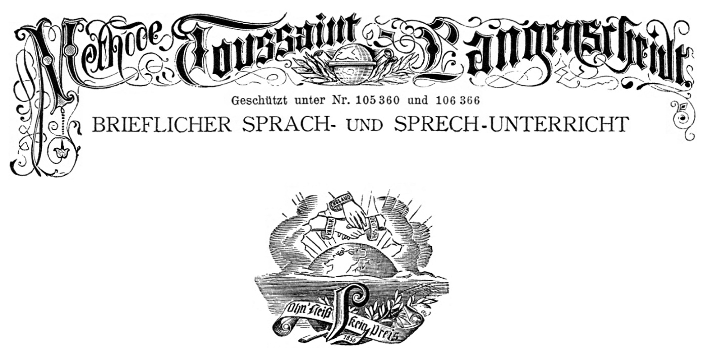 Methode Toussaint-Langenscheidt, Brieflicher Sprach- und Sprech-Unterricht (für das Selbststudium Erwachsener); Kopfbereich mit Schriftzügen und Logos, wie er bei den Titelblättern zahlreicher MeTouLa-Sprachlernbriefe verwendet wurde. – Im unteren Globus-Logo (Schutzmarke) sind u.a. drei ineinander greifende Hände mit den Aufschriften Frankreich, England und Deutschland zu erkennen, darunter steht Ohn' Fleiß kein Preis und ein großes L (für Langenscheidt) mit der Jahreszahl 1856 (Verlagsgründung und die Herausgabe des ersten MeTouLa-Werks).